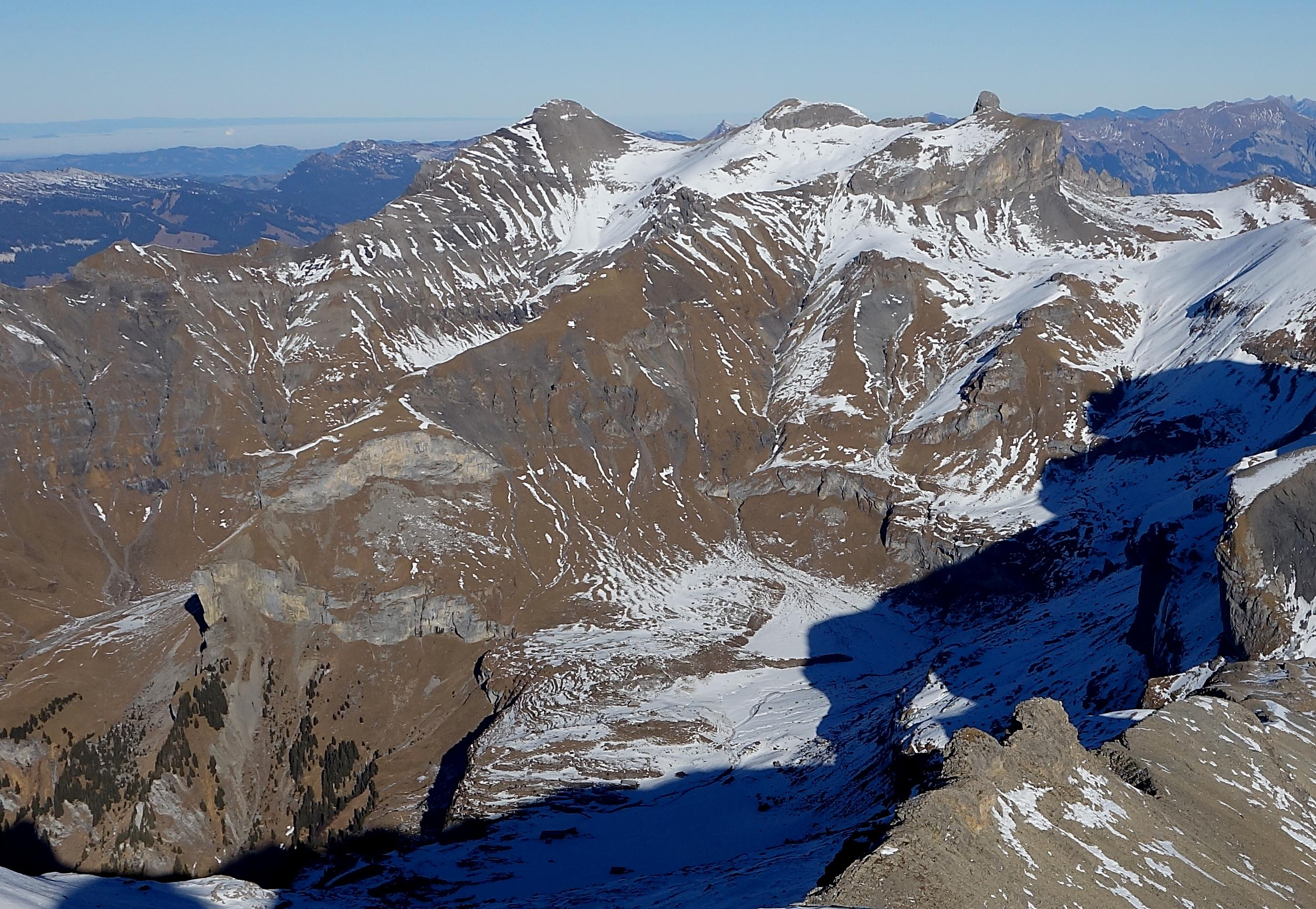 Schwalmere vom Wild Andrist aus, v.l.n.r. Schwalmere, Hohganthorn und Drättehorn